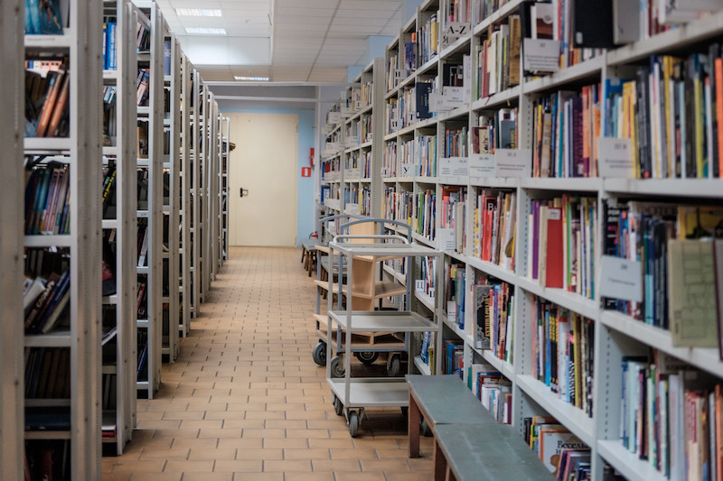 Государственное бюджетное учреждение культуры г. Москвы «Центральная универсальная научная библиотека имени Н.А. Некрасова» Главное здание Библиотеки им. Н.А. Некрасова 105005, Москва, ул. Бауманская, д. 58/25, стр. 14 (м. «Бауманская»)